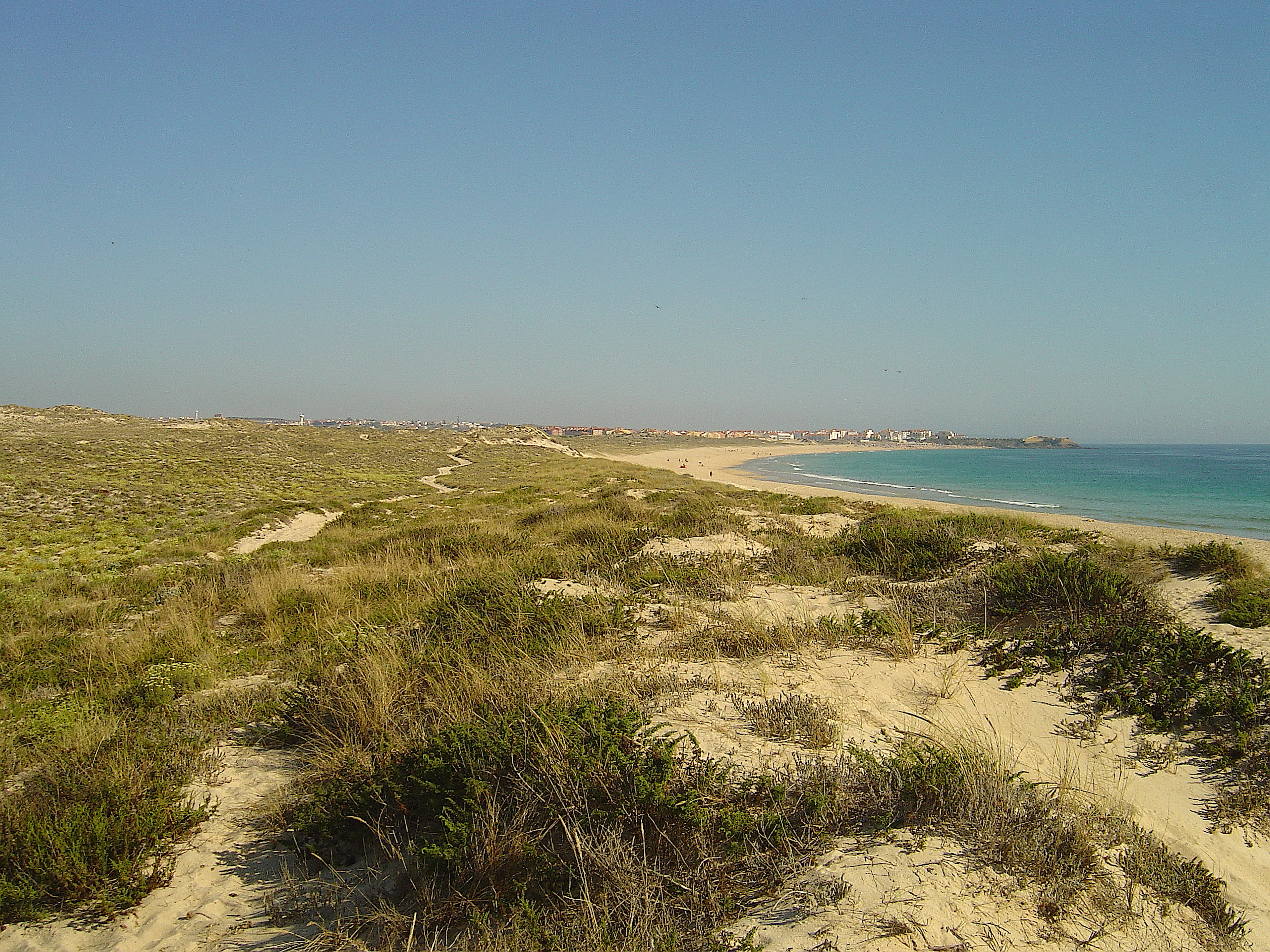 Praia do Medão-Supertubos ( Portugal )